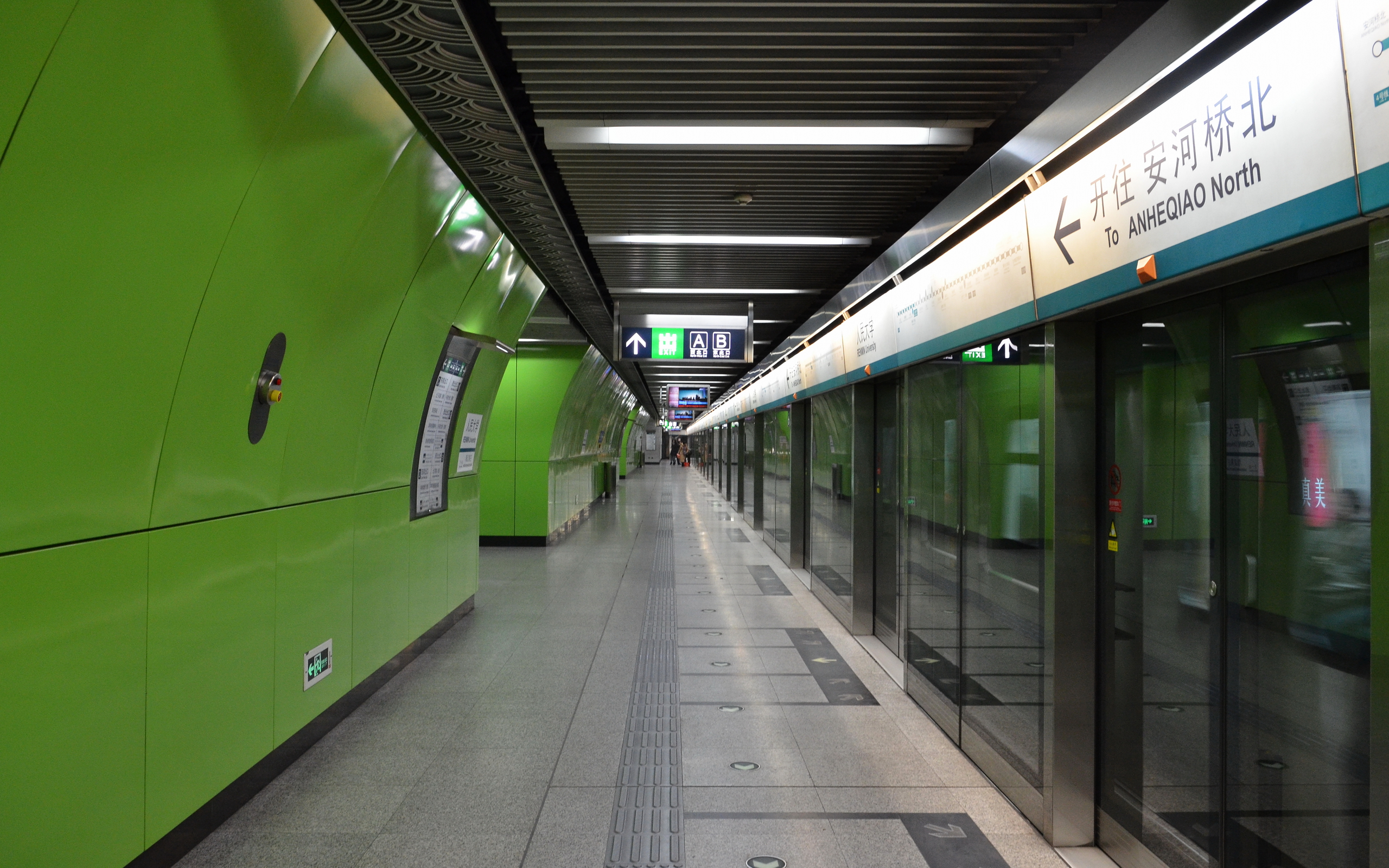 北京地铁4号线的人民大学站的分离式岛式站台，开往安河桥北站方向一侧站台。